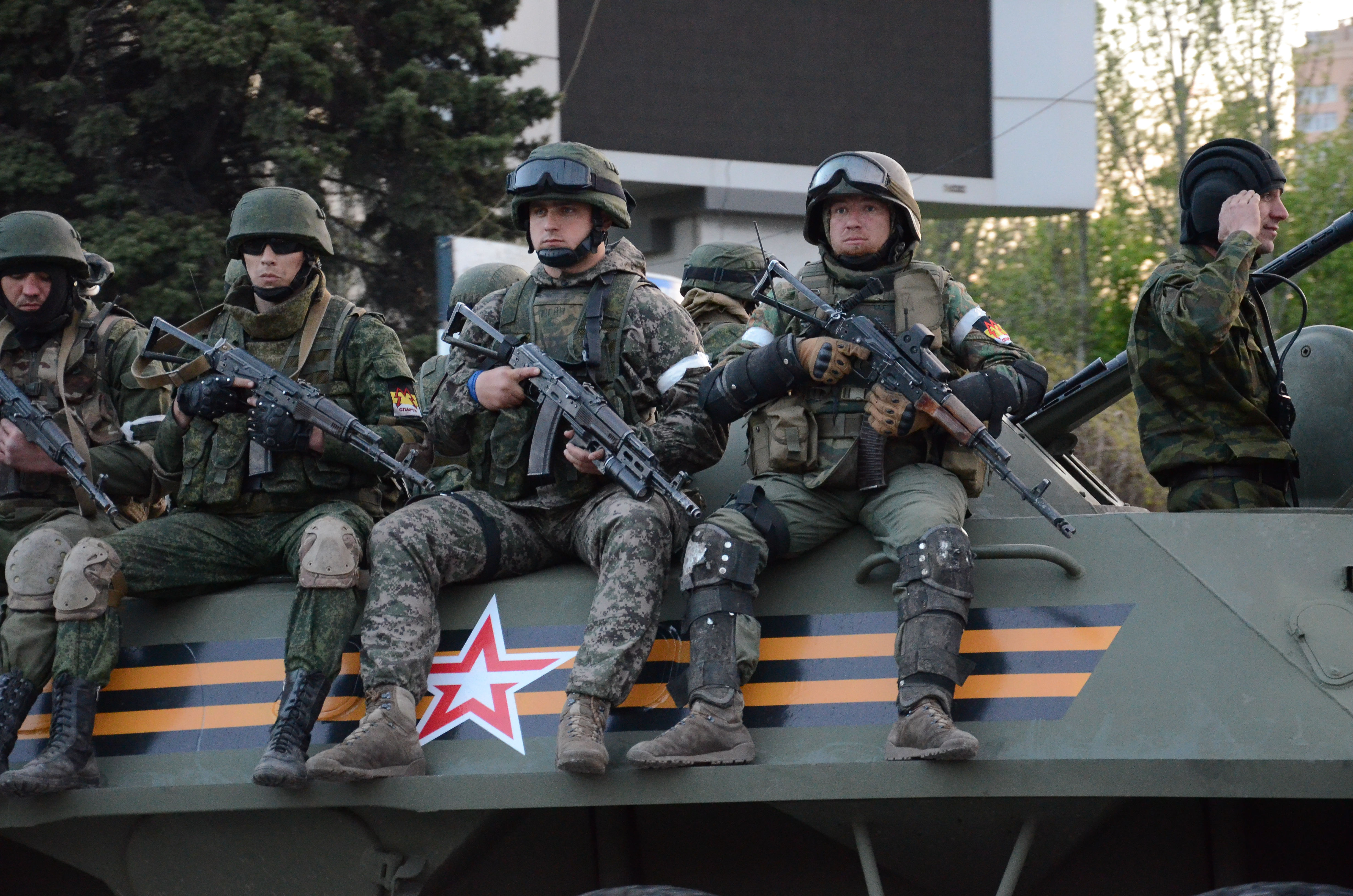 Репетиция парада в честь дня Победы в Донецке